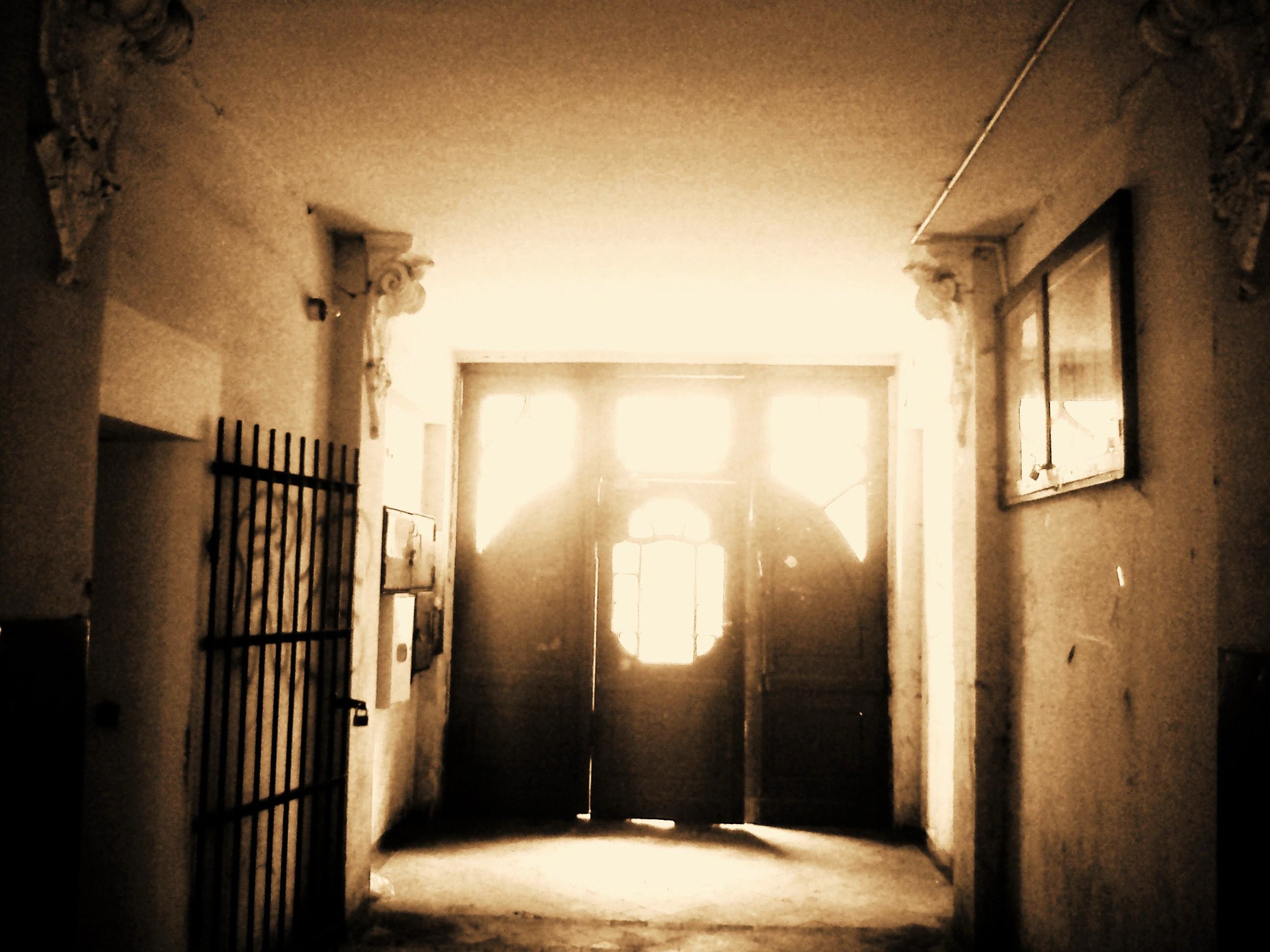 Poznań Łazarz, ul. Niegolewskich 6 / ul. Głogowska 72 - brama kamienicy (zabytek nr A 436) Suwalskich House, Poznan, Glogowska Street